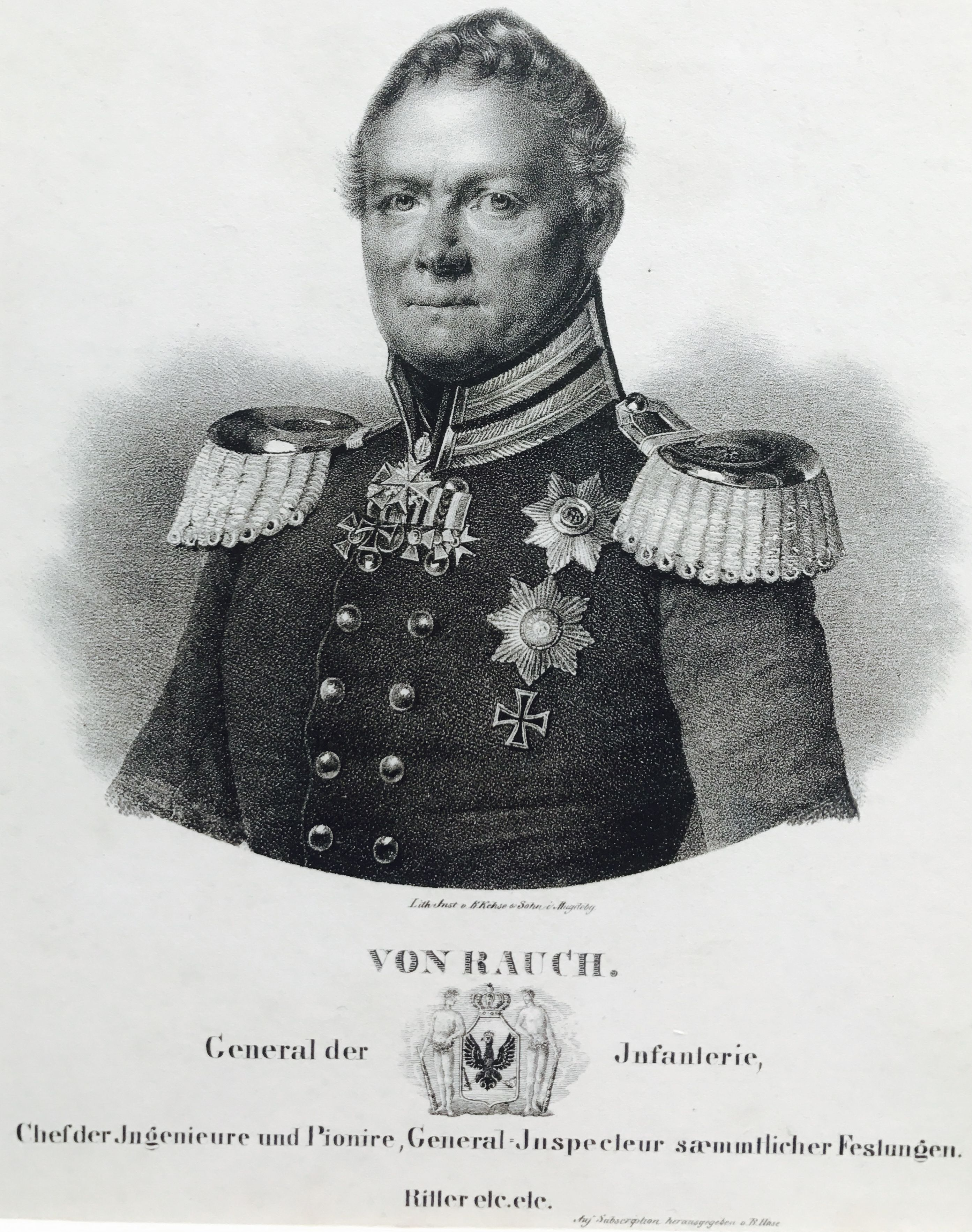 Minister und General der Infanterie Gustav von Rauch, Ehrenbürger von Berlin, Lithografie (um 1830), Quelle: Lithografisches Institut von B.Kehse&Sohn, Magdeburg